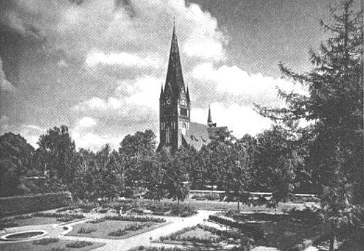 Stadtkirche Neustettin about 1900